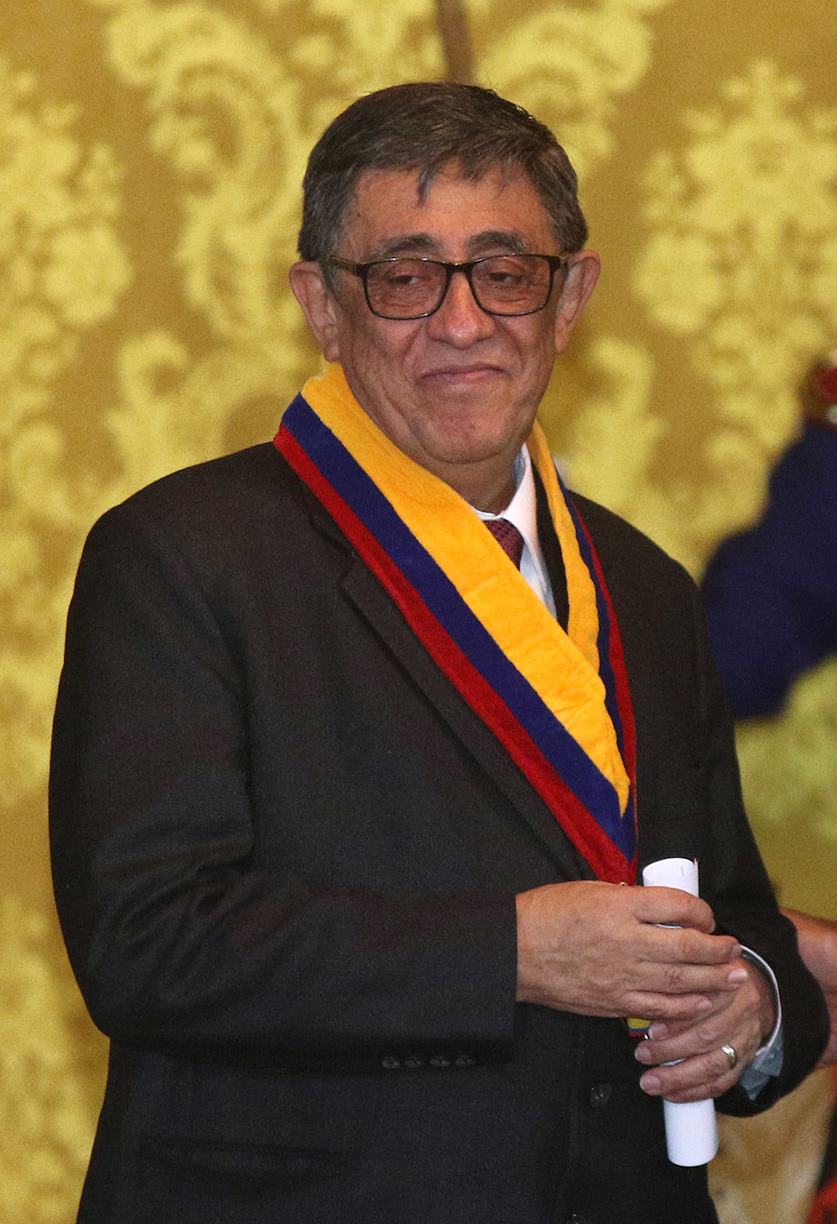 Quito 10 Ago (Andes).- César Dávila Vázquez, Beatriz Parra y Manuel Cruz se hicieron acreedores del galardón mas alto del gobierno ecuatoriano, el premio Eugenio Espejo por su desempeño y labor trascendental en la república. Fotografías: Carlos Rodríguez/Andes. PREMIOS EUGENIO ESPEJO Quito 10 Ago (Andes).- Jorge Dávila Vázquez, Beatriz Parra y Manuel Cruz se hicieron acreedores del galardón mas alto del gobierno ecuatoriano, el premio Eugenio Espejo por su desempeño y labor trascendental en la república. Fotografías: Carlos Rodríguez/Andes.